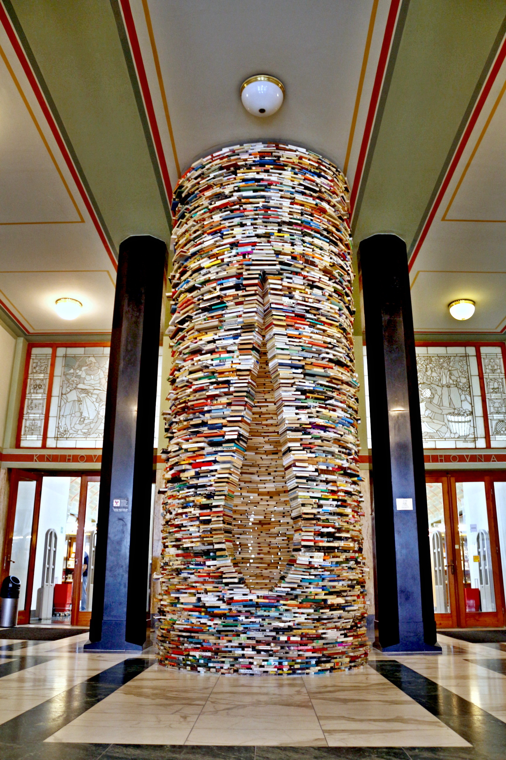 Městská knihovna v Praze, interiér